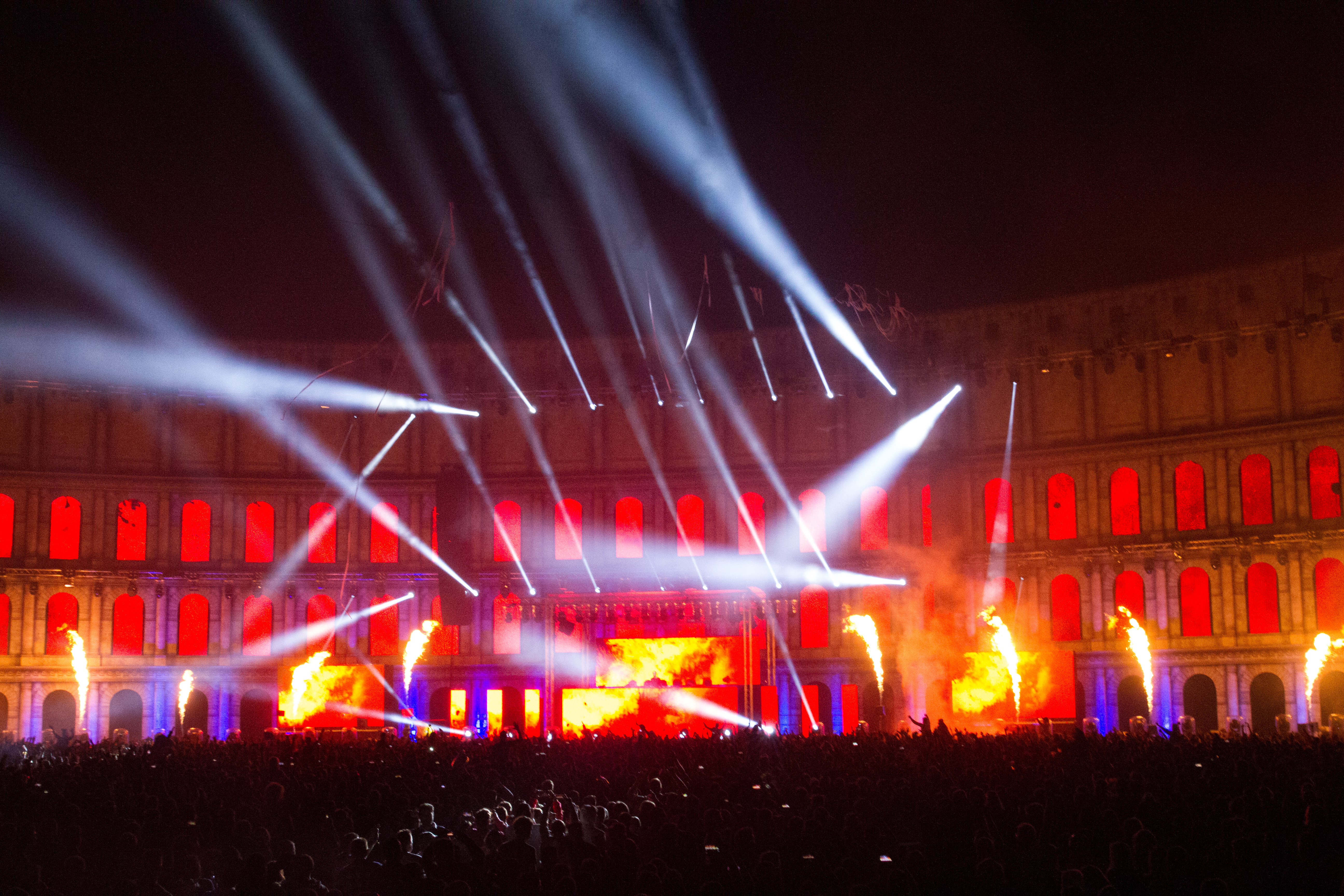 Die Mainstage beim 14. Airbeat-One Dance Festivals das vom 16. bis 19. Juli 2015 auf dem Flugplatz Neustadt-Glewe stattfand.